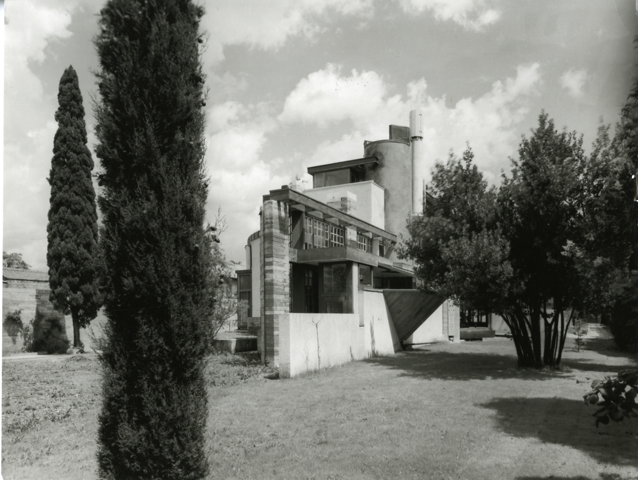 Servizio fotografico : Udine, 1961 / Paolo Monti, Istituto di fotografia Paolo Monti. - Stampe: 3 : Positivo b/n, gelatina bromuro d'argento/ carta, 24x30. - ((Al verso delle stampe manoscritto numero di negativo corrispondente: 4501, 4473, 4490. Sul coperchio della scatola, manoscritto a pennarello: "Musei".